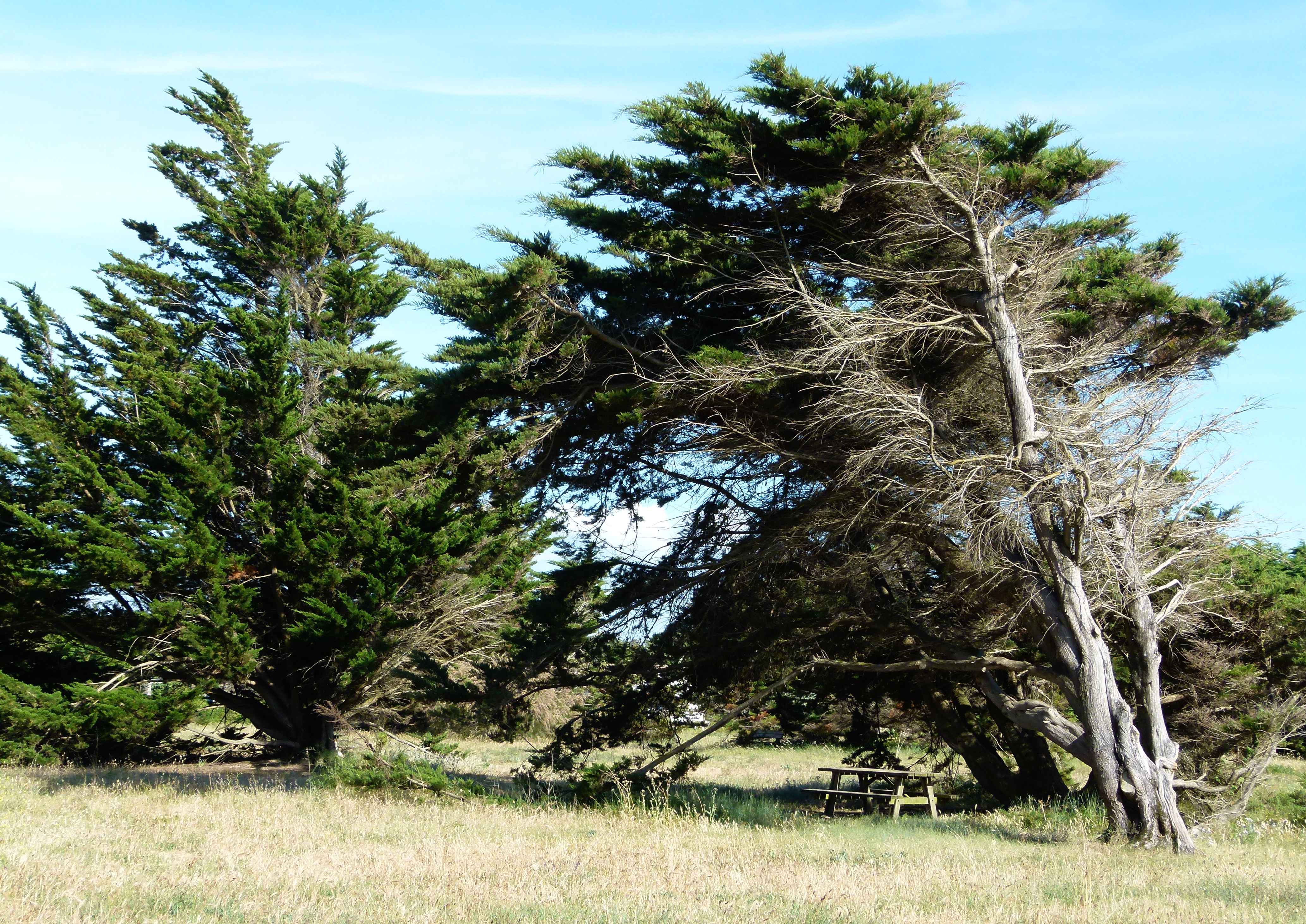 Cyprès de Lambert (Cupressus macrocarpa), La Menounière (Île d'Oléron, Charente-Maritime, France).